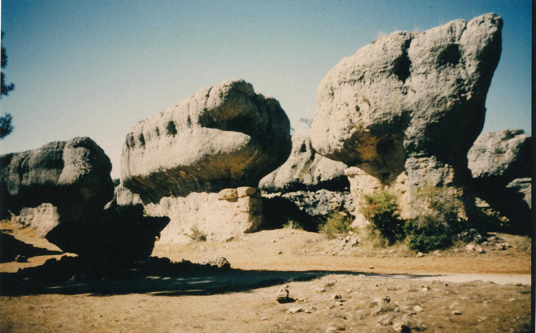 Landschaft bei Cuenca: "Ciudad Encantada" Datum: 10/1986 Urheber: Michael Pfeiffer Quelle: privates Fotoalbum des Urhebers